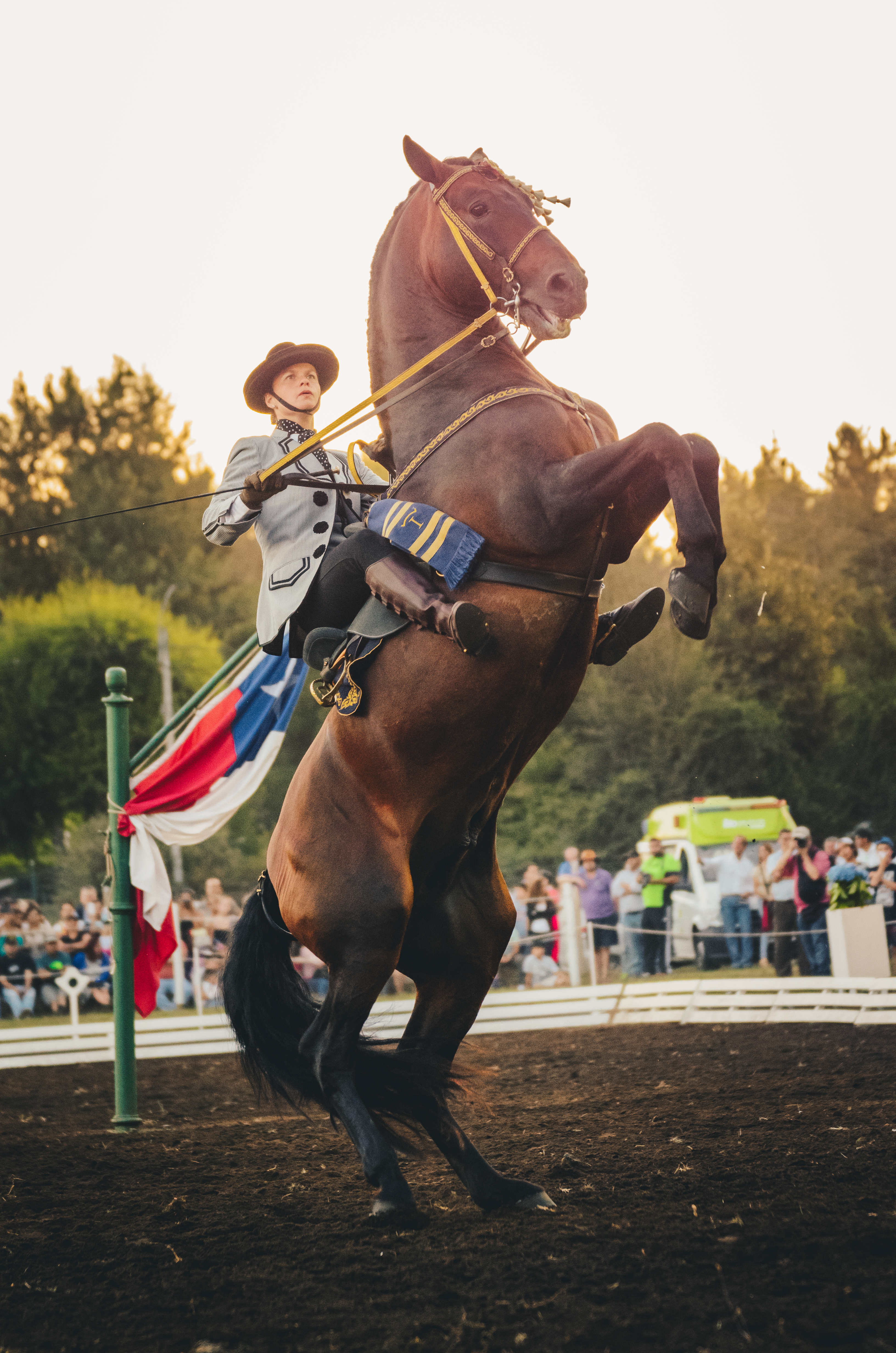 Espectaculo en Pucón